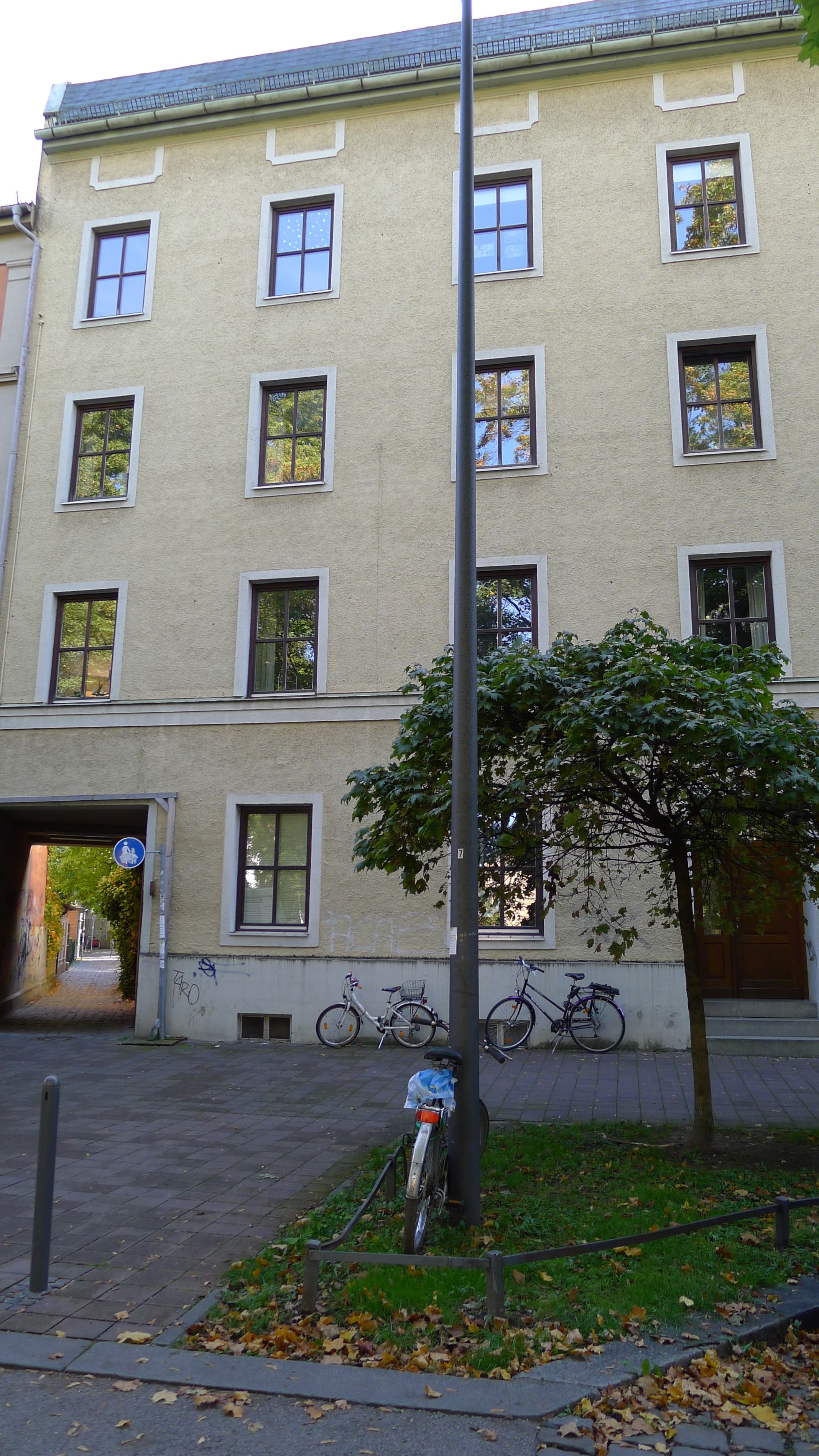 Hier lebte Carlamaria Heim über 50 Jahre lange: Wohnhaus am Johannis Platz 10